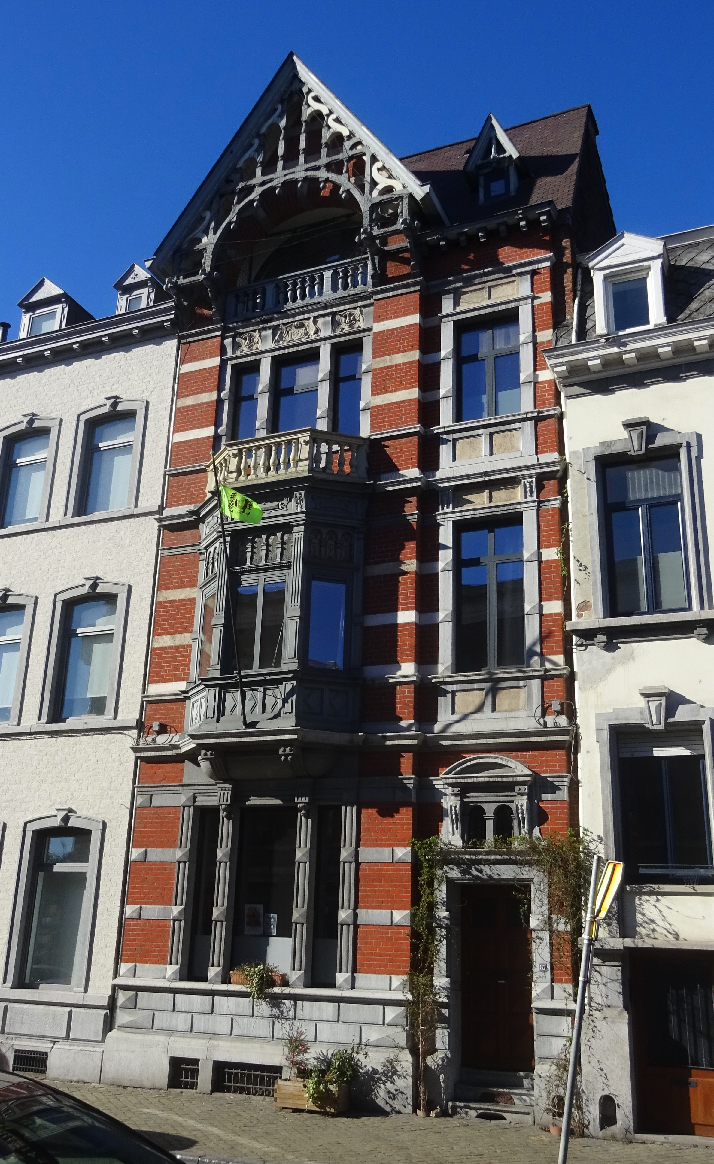 Rue Maghin, 87, Liège, immeuble de 1889, architecte A. Capelle